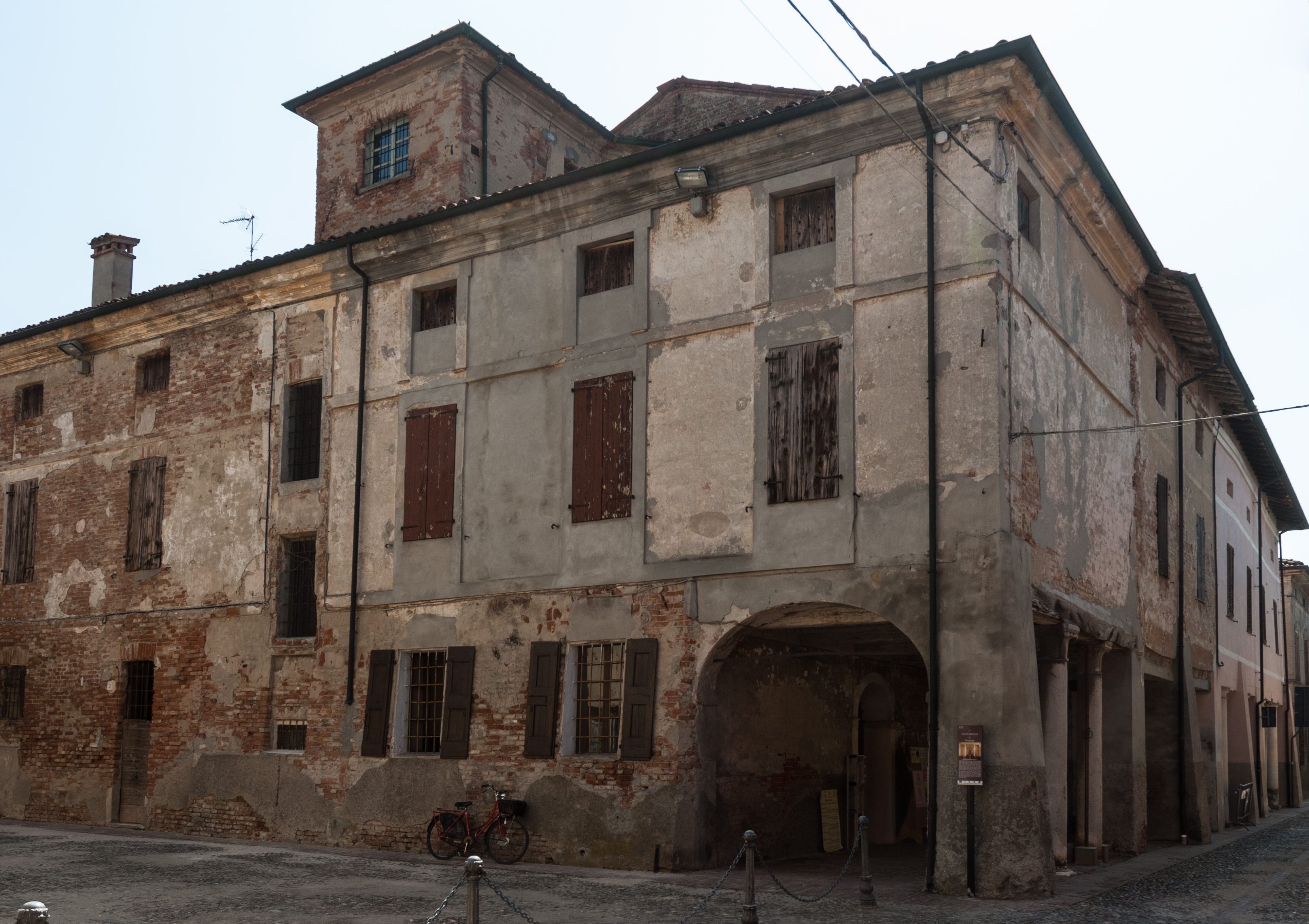 La sinagoga die Sabbioneta, Provincia di Mantova, Italia